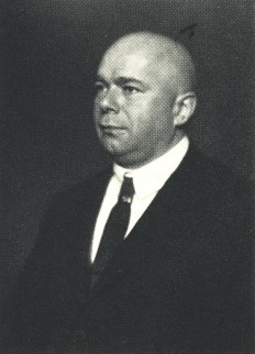 Porträt des Mäzens und Bremer Kunstsammlers Ludwig Roselius (1874–1943).